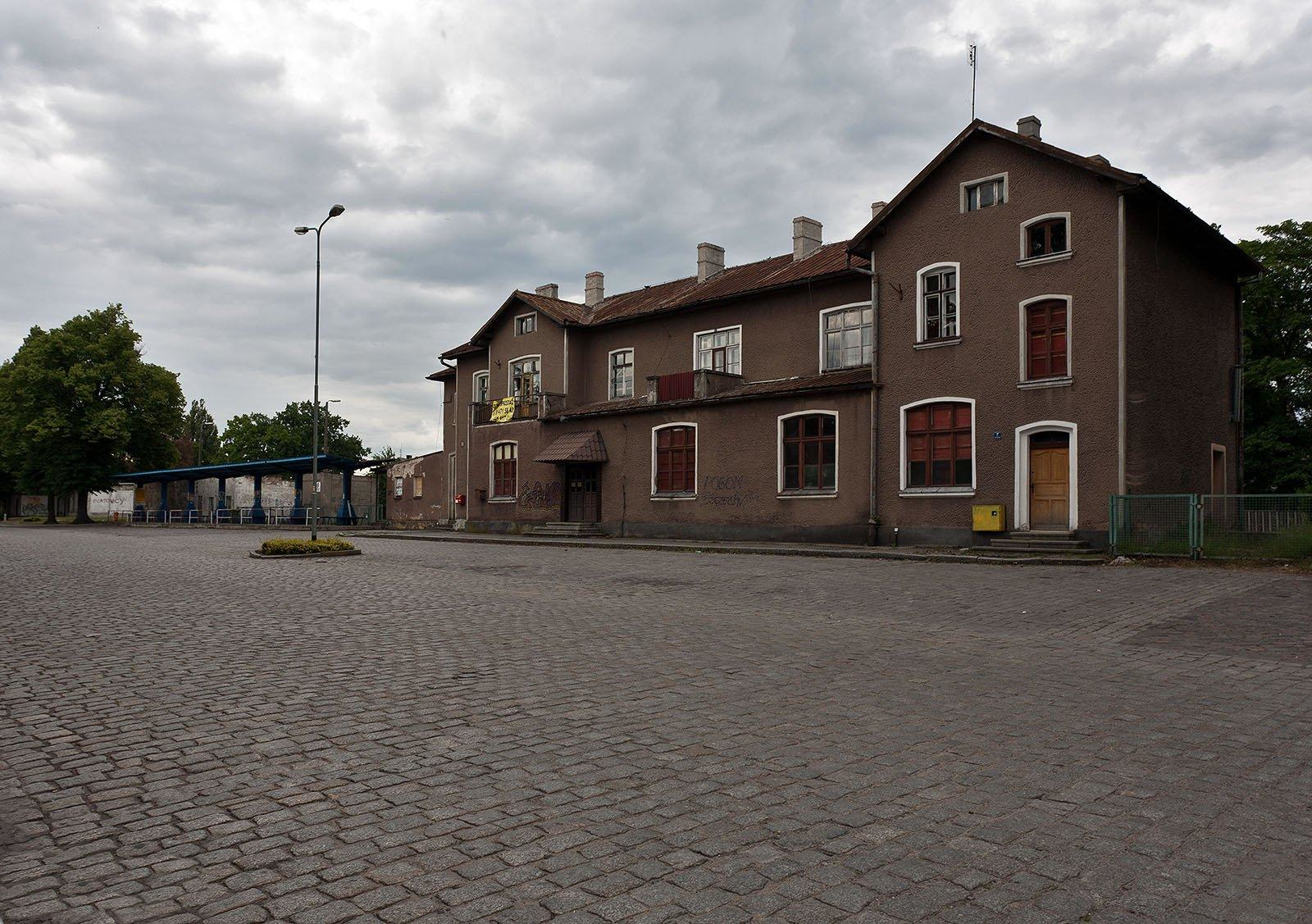 Budynek dworca od strony dojazdu. Niebieska wiata należy do dworca autobusowego.